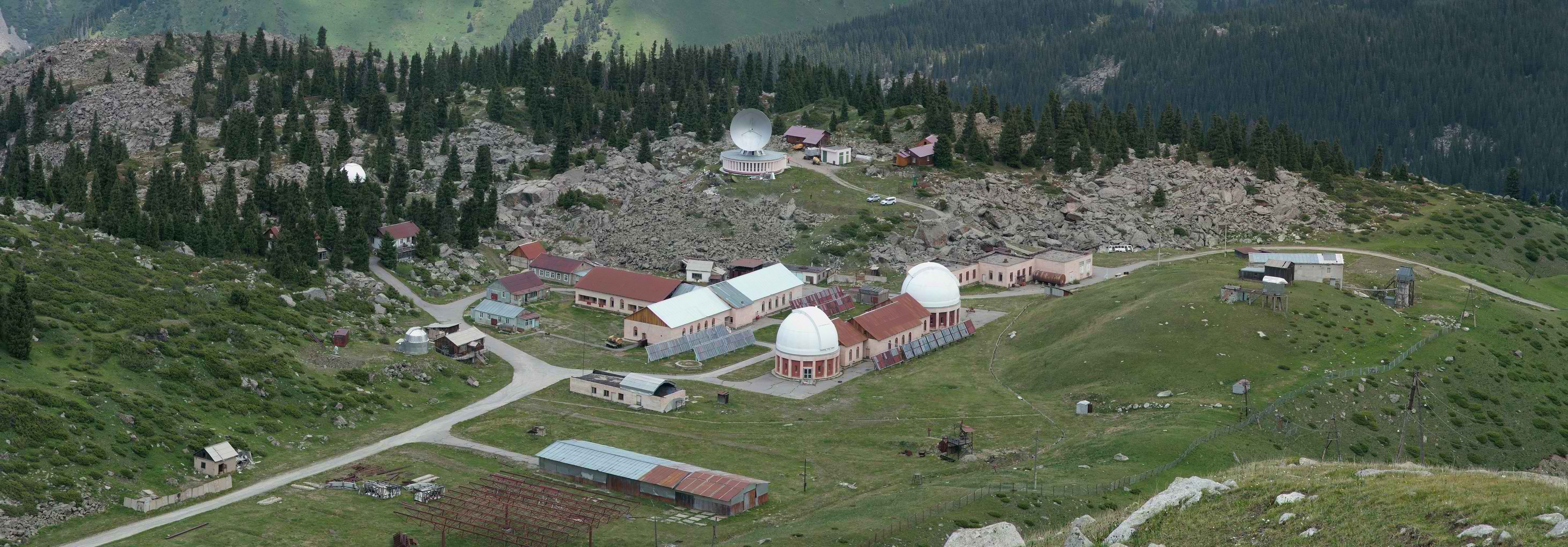 Панорама площадки Тянь-Шанской астрономической обсерватории. Два больших белых купола - Цейссы-1000. Дальний уже запустили, ближний в планах. Блестящий из жести (самый левый куполок на кадре) АЗТ-14. Чуть левее дальнего метрового купола - тоже АЗТ-14. Радиотелескоп принадлежит институту ионосферы. (по состоянию на июнь 2010 года.)